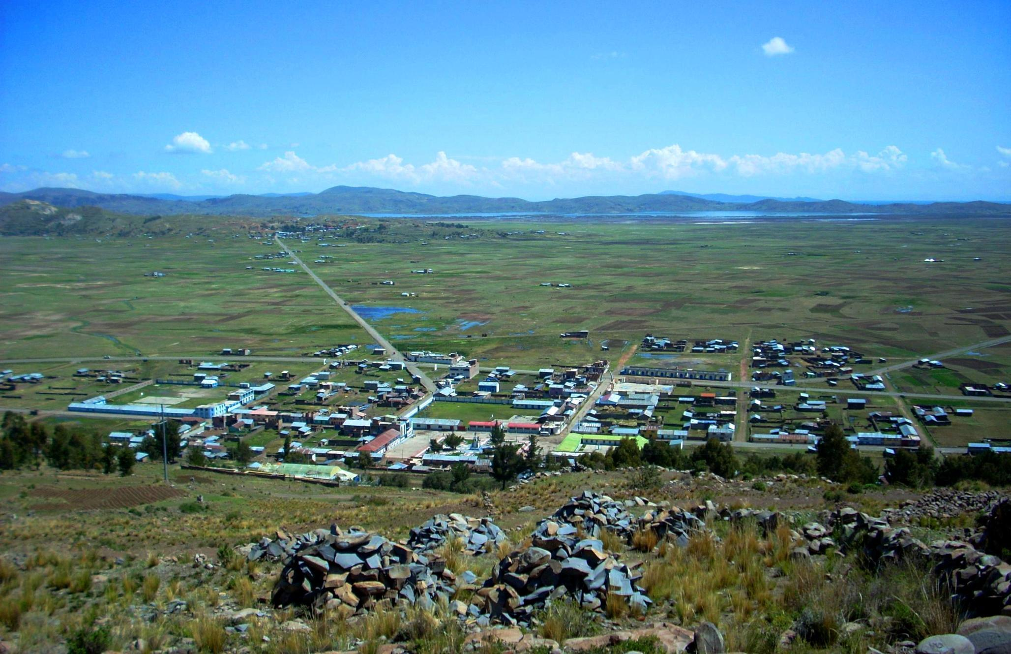 Vista panoramica de la Villa de Plateria en Puno capital del distrito de Plateria